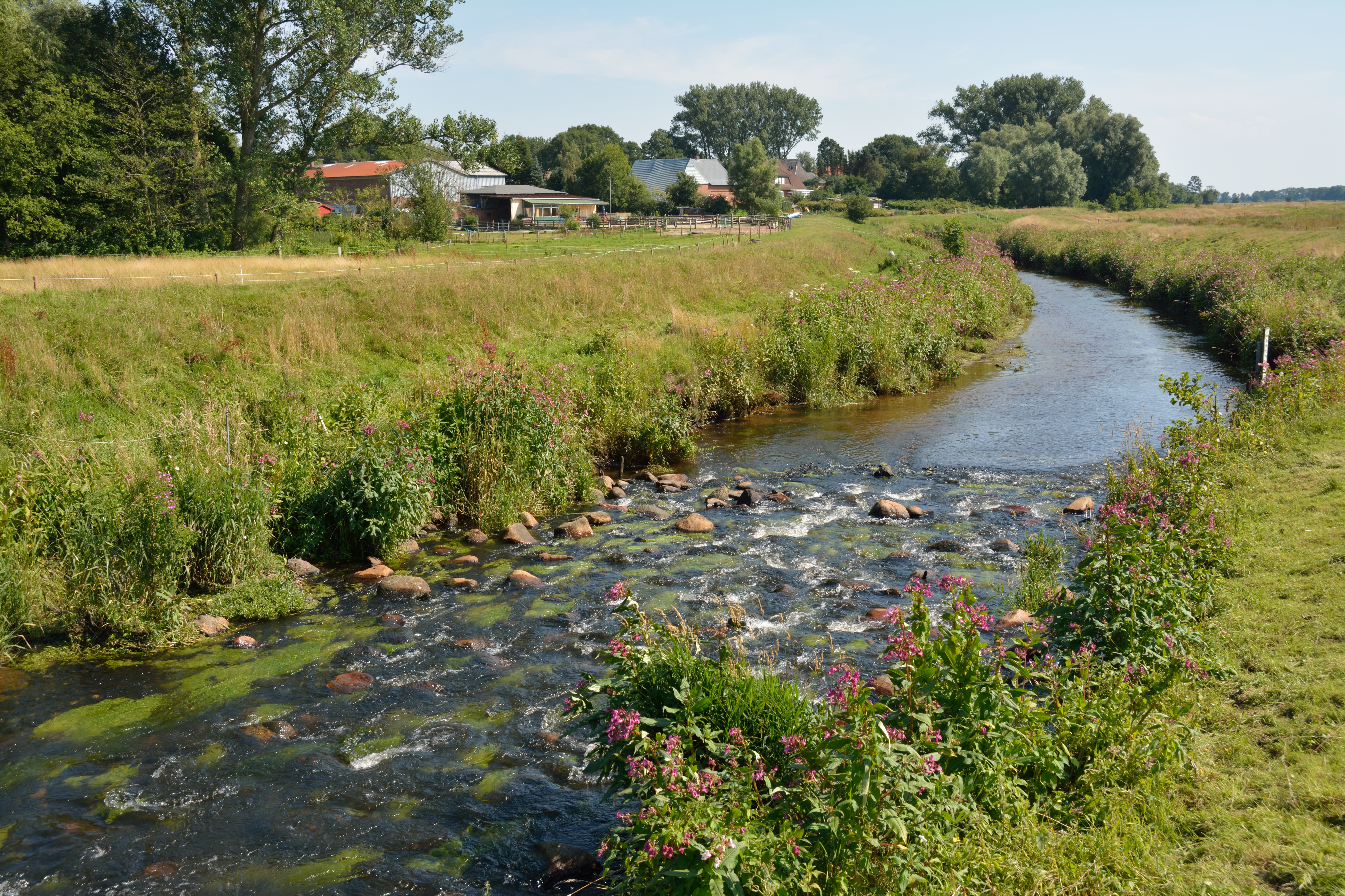 Impressionen aus dem FFH-Gebiet "Rantzau-Tal" an der Brücke in Winseldorf